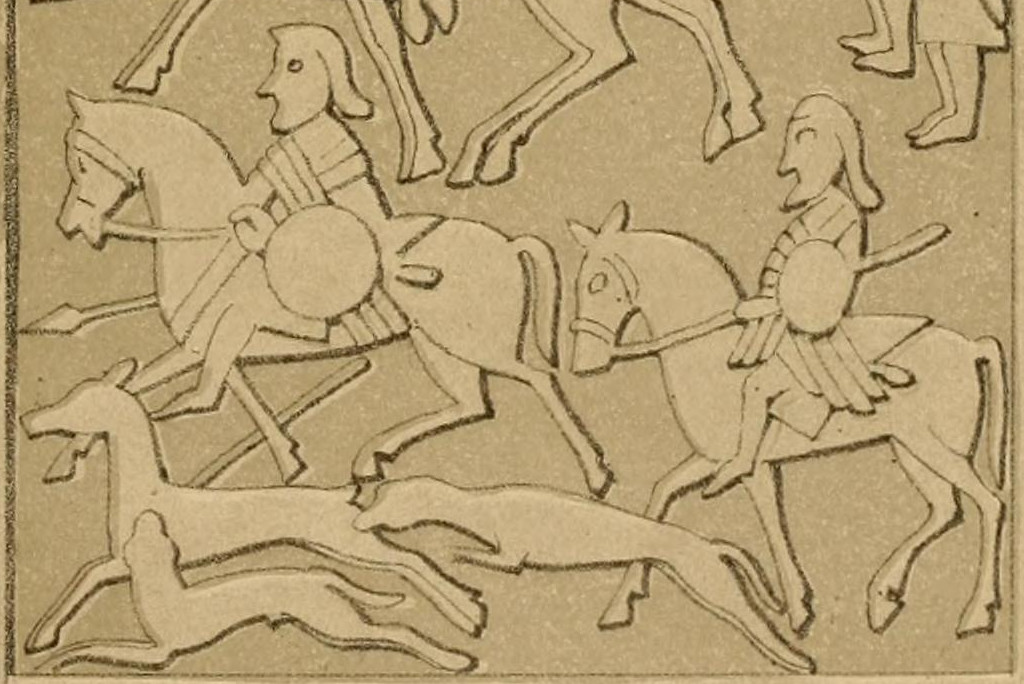 Extrait de la Pierre de Hilton of Cadboll (symbole pictural et dalle croisée, lithographie), montrant des vertagus (lévriers) à la chasse.